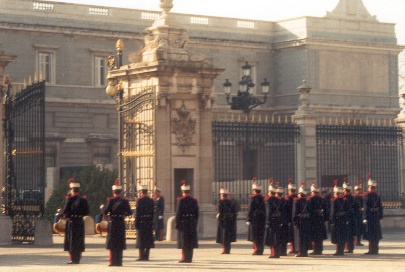 Guardias reales a caballo, en Madrid